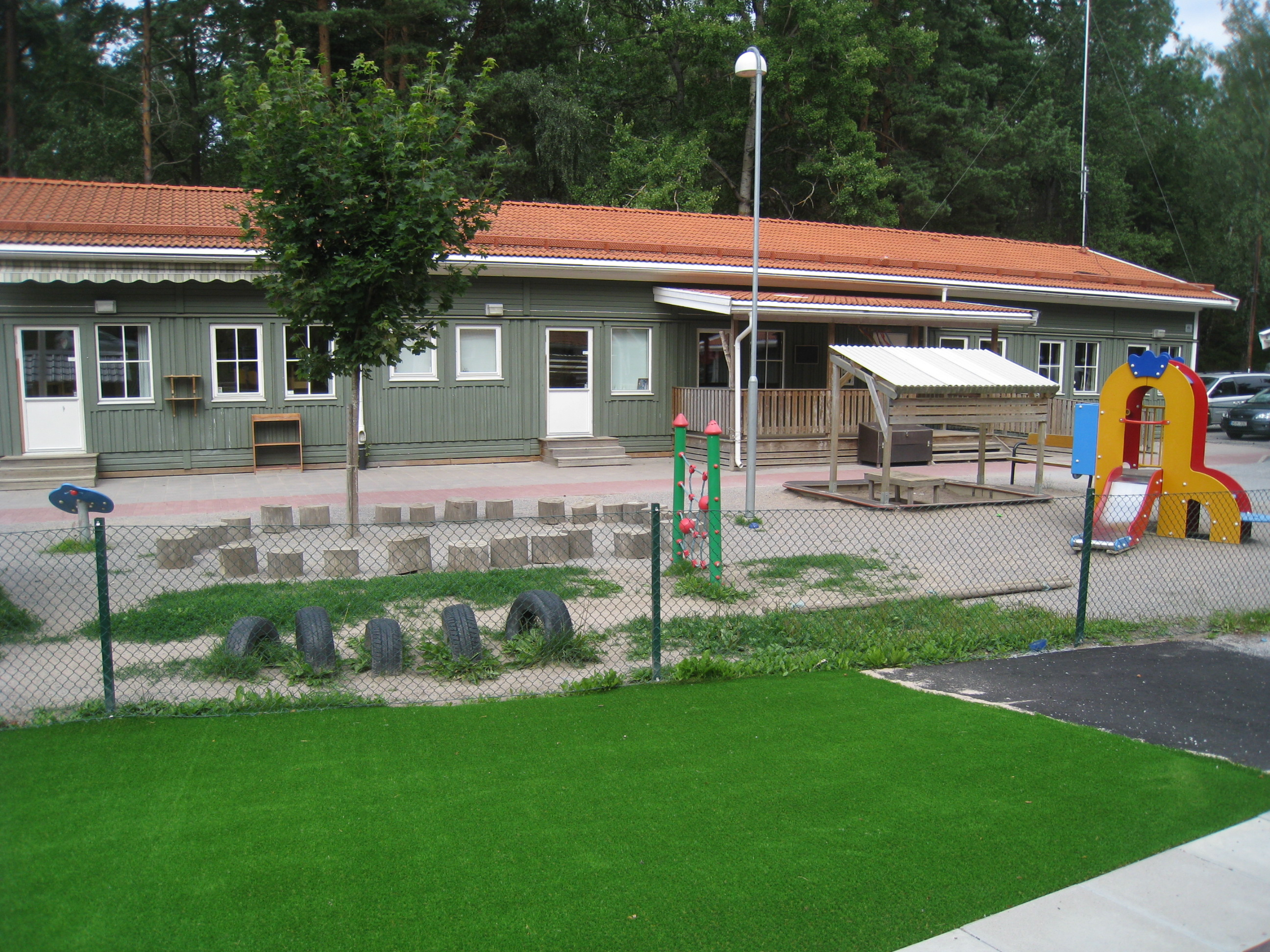 Förskolan Solviksängen i södra delen av Solviksängen i Smedslätten, nära Solviksbadet, Bromma.